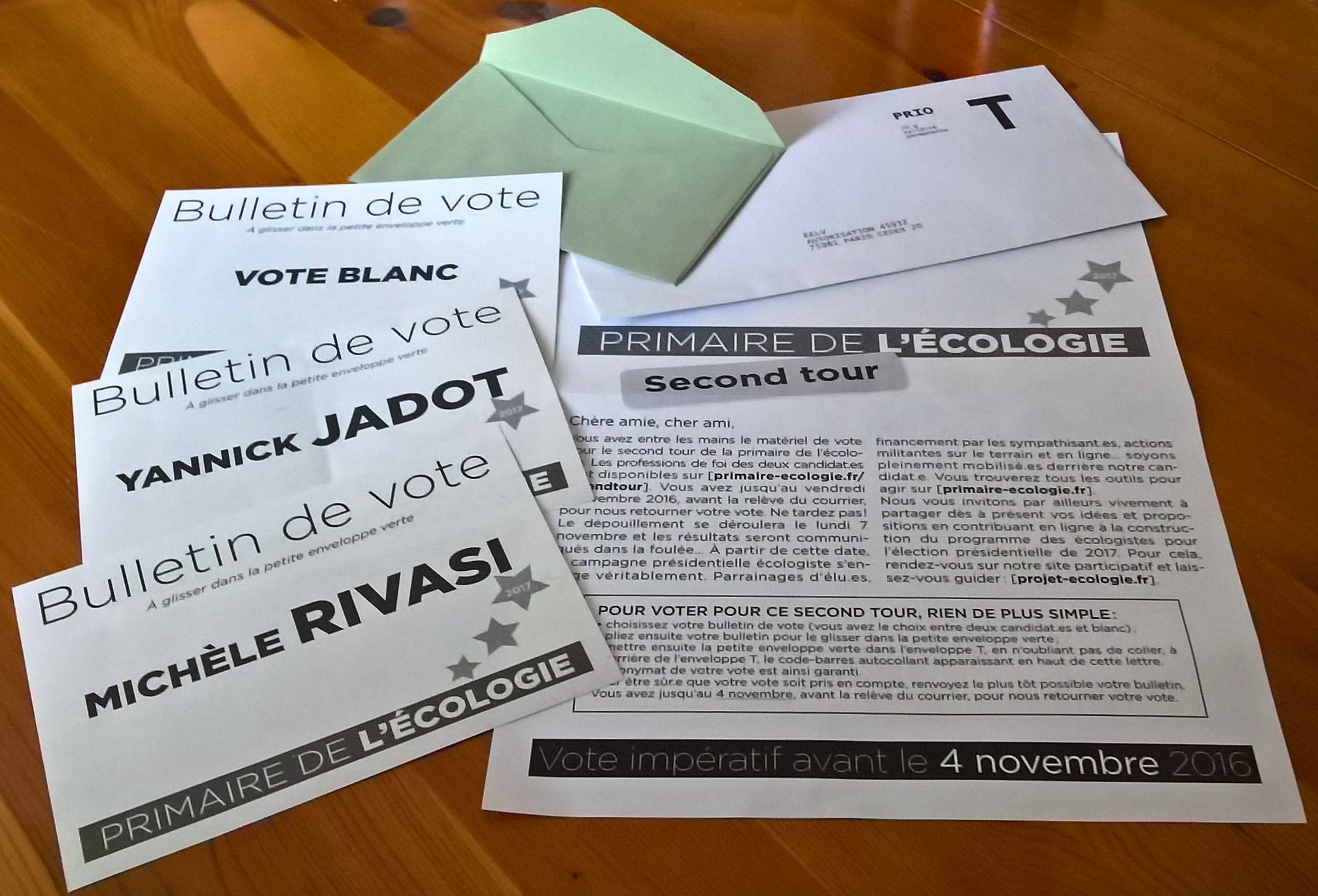 Matériel de vote pour le second tour de la primaire présidentielle française des écologistes d'EELV en 2016.